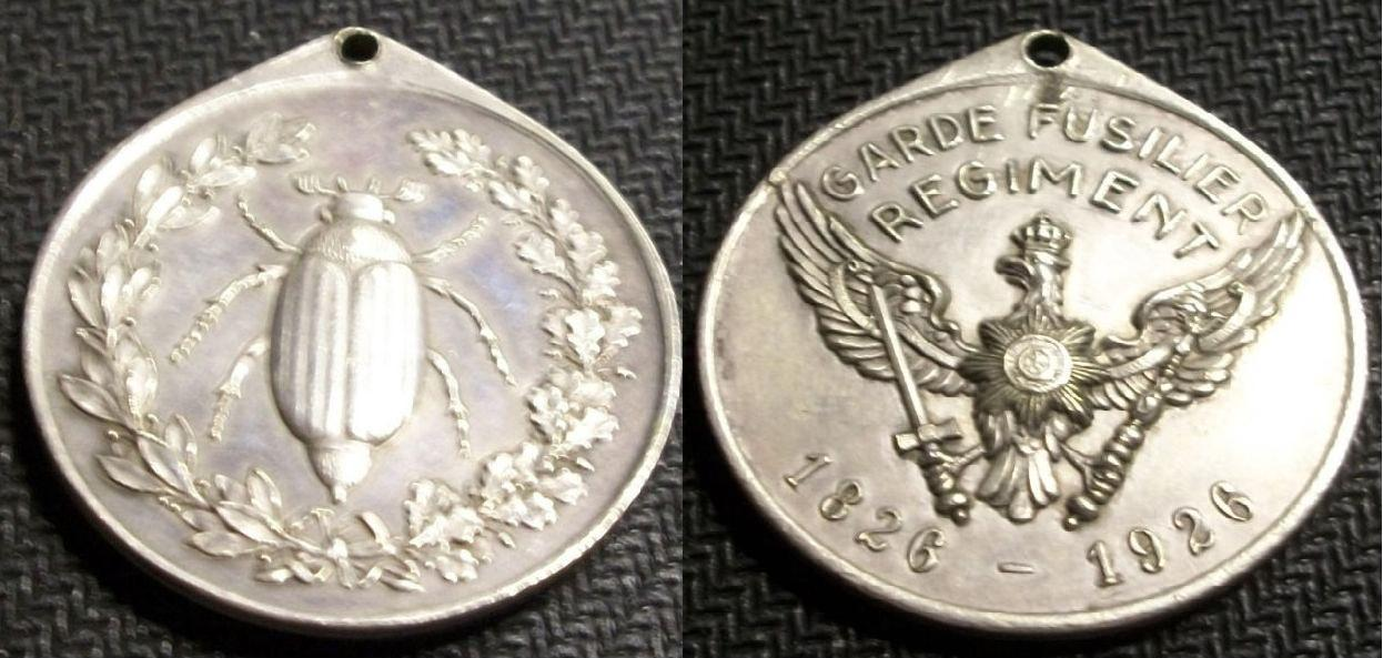 Erinnerungsmedalle des Garde Füssilier Regiments 1926